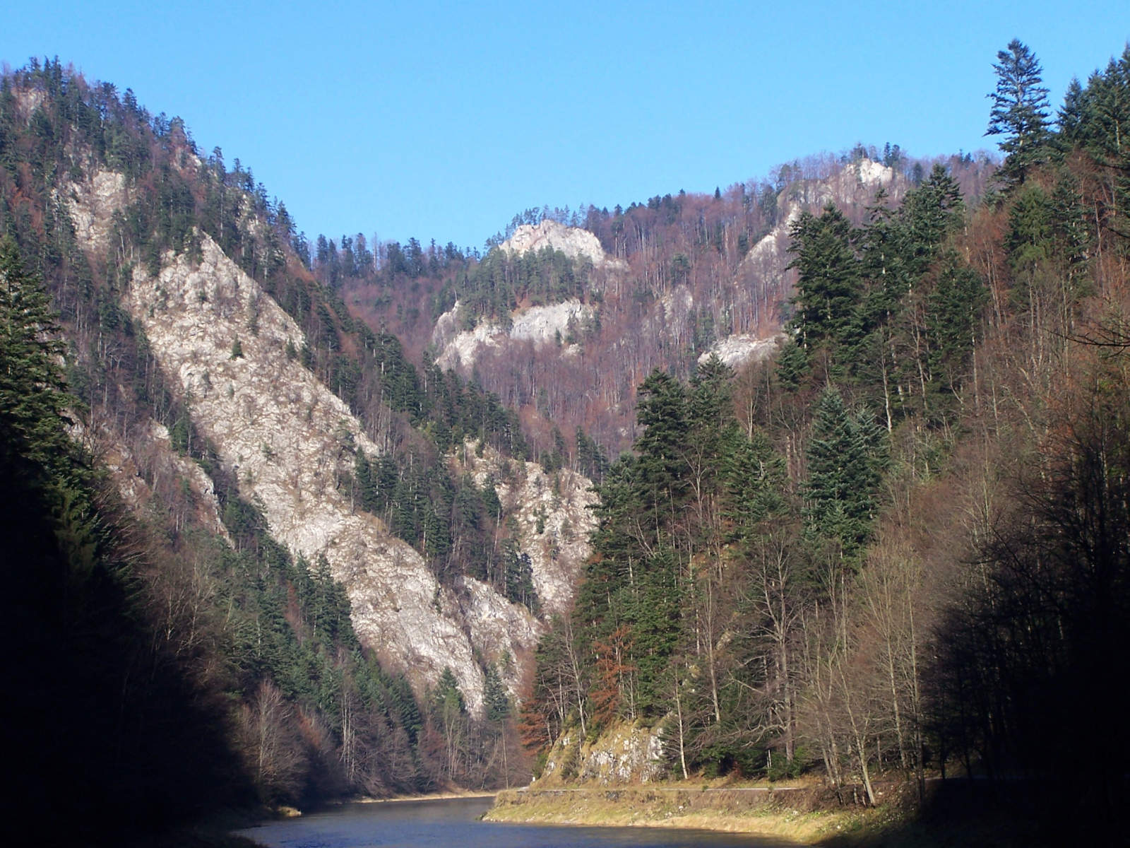 Przełom Dunajca